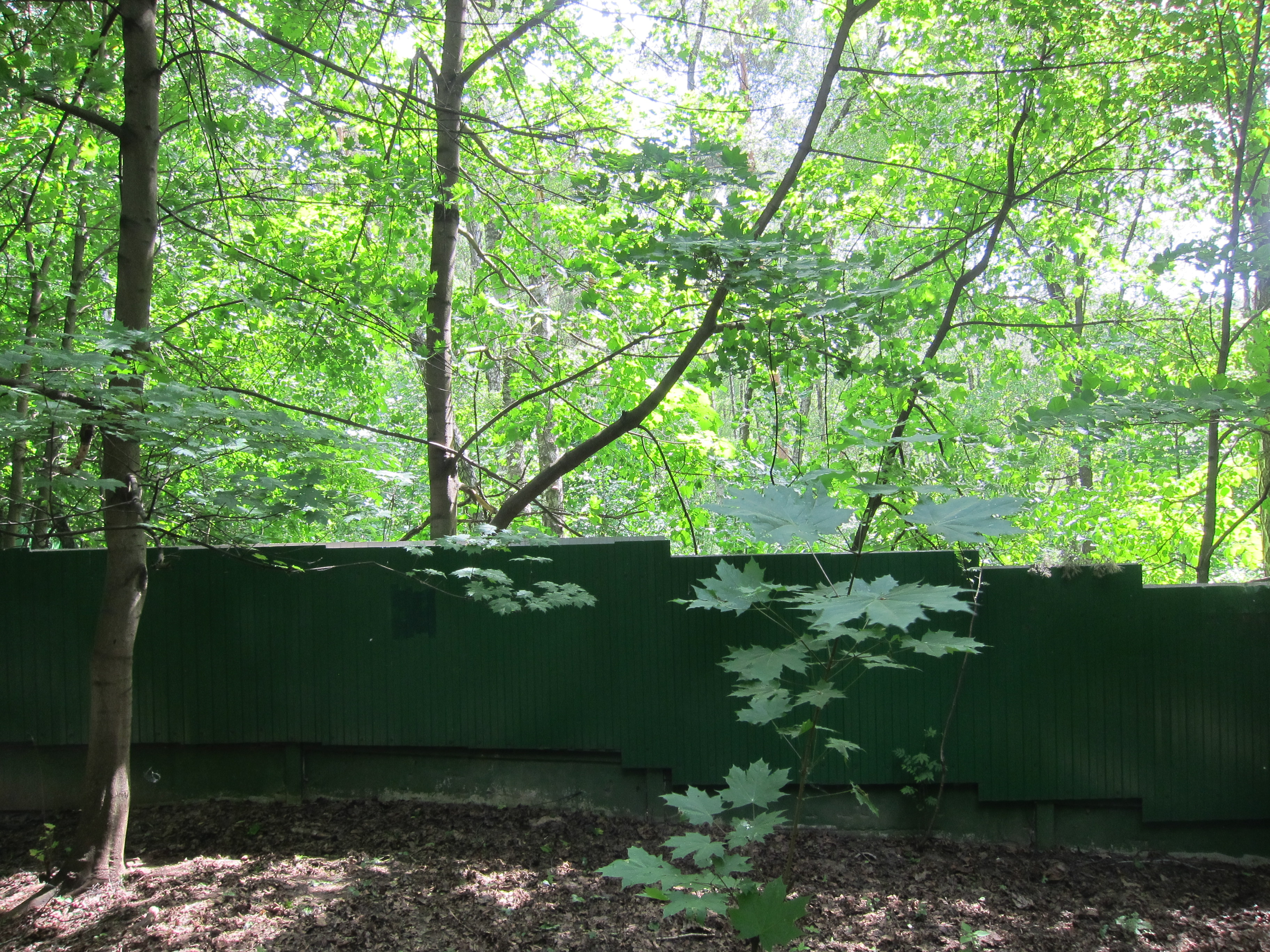 Le mur d'enceinte de la datcha de Kountsevo.